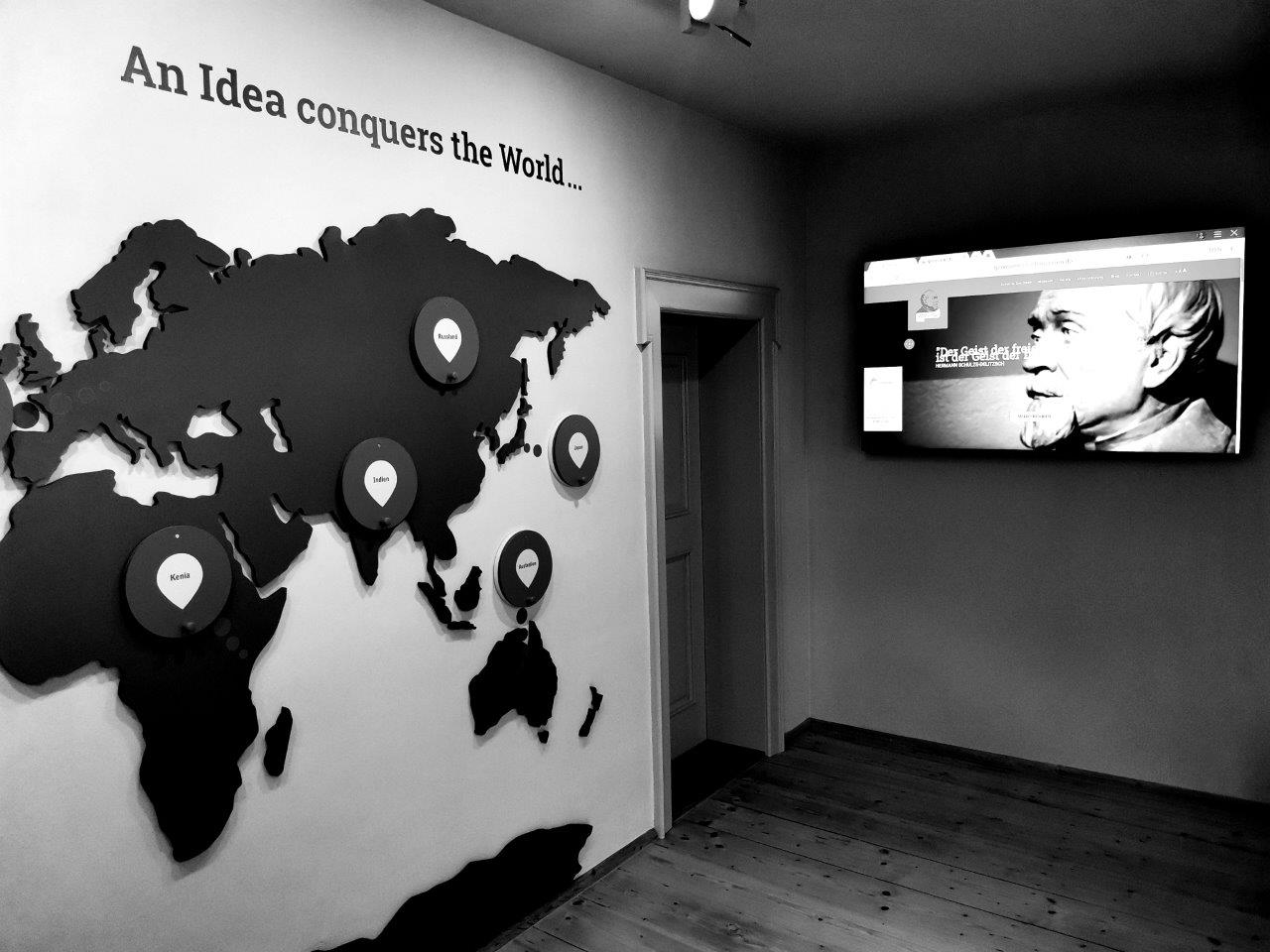 Versammlungsraum im Erdgeschoss des Deutschen Genossenschaftsmuseums 2020